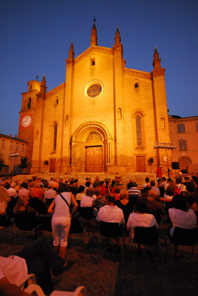 Notturno della Collegiata